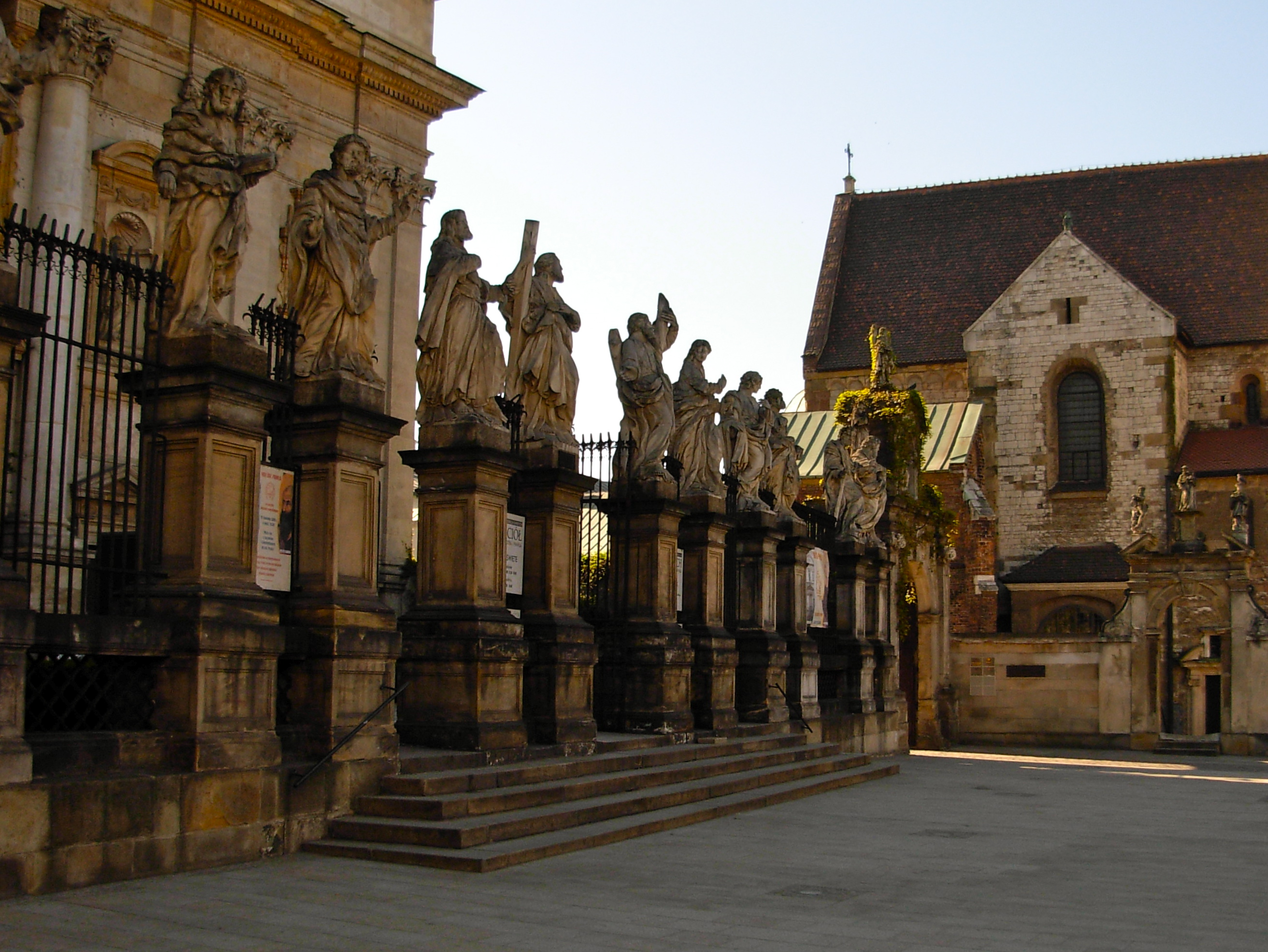 Krokuvos senamiestis